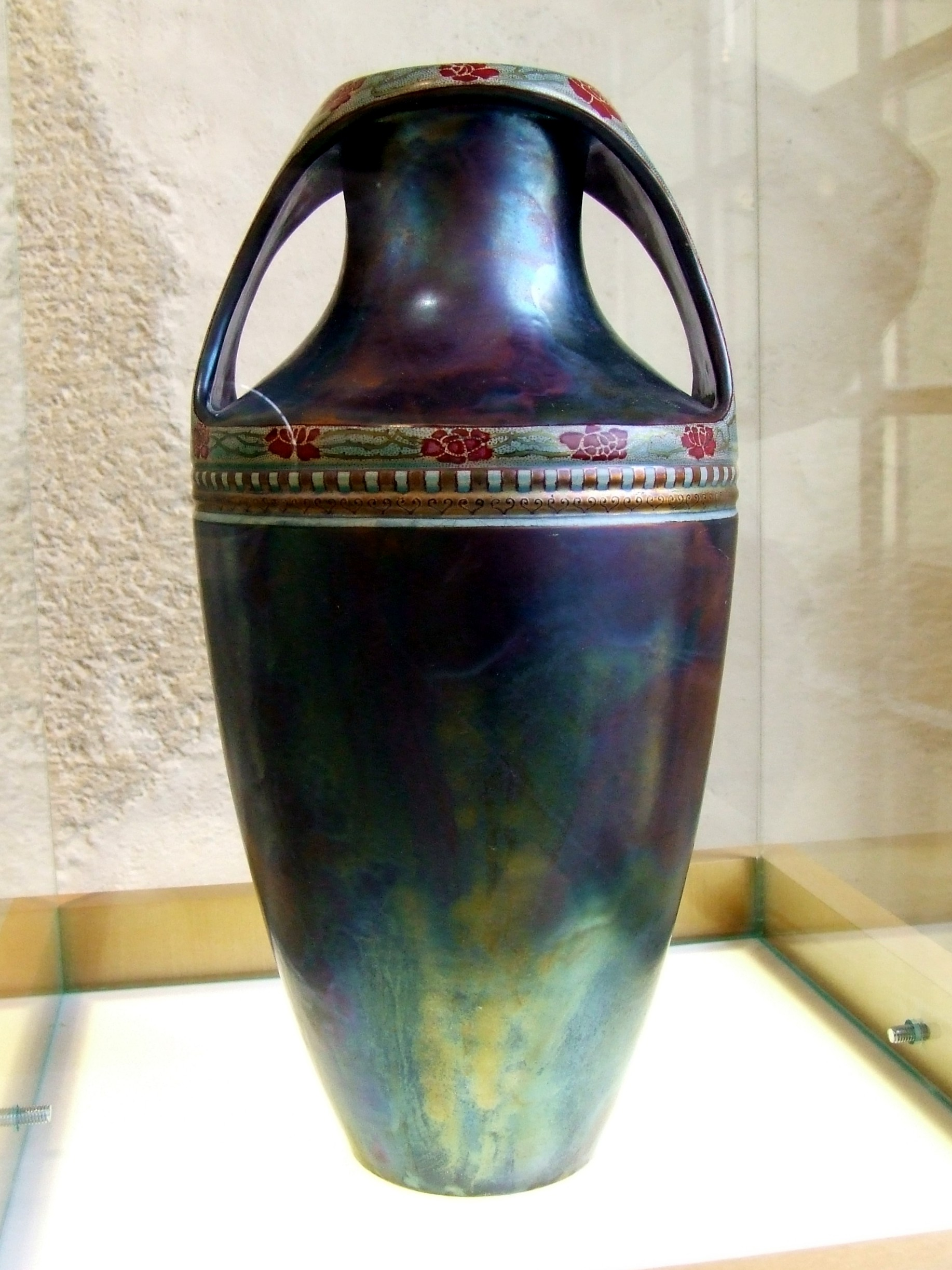 Váza. Apáti Abt Sándor alkotása (1900). Zsolnay Múzeum, Pécs